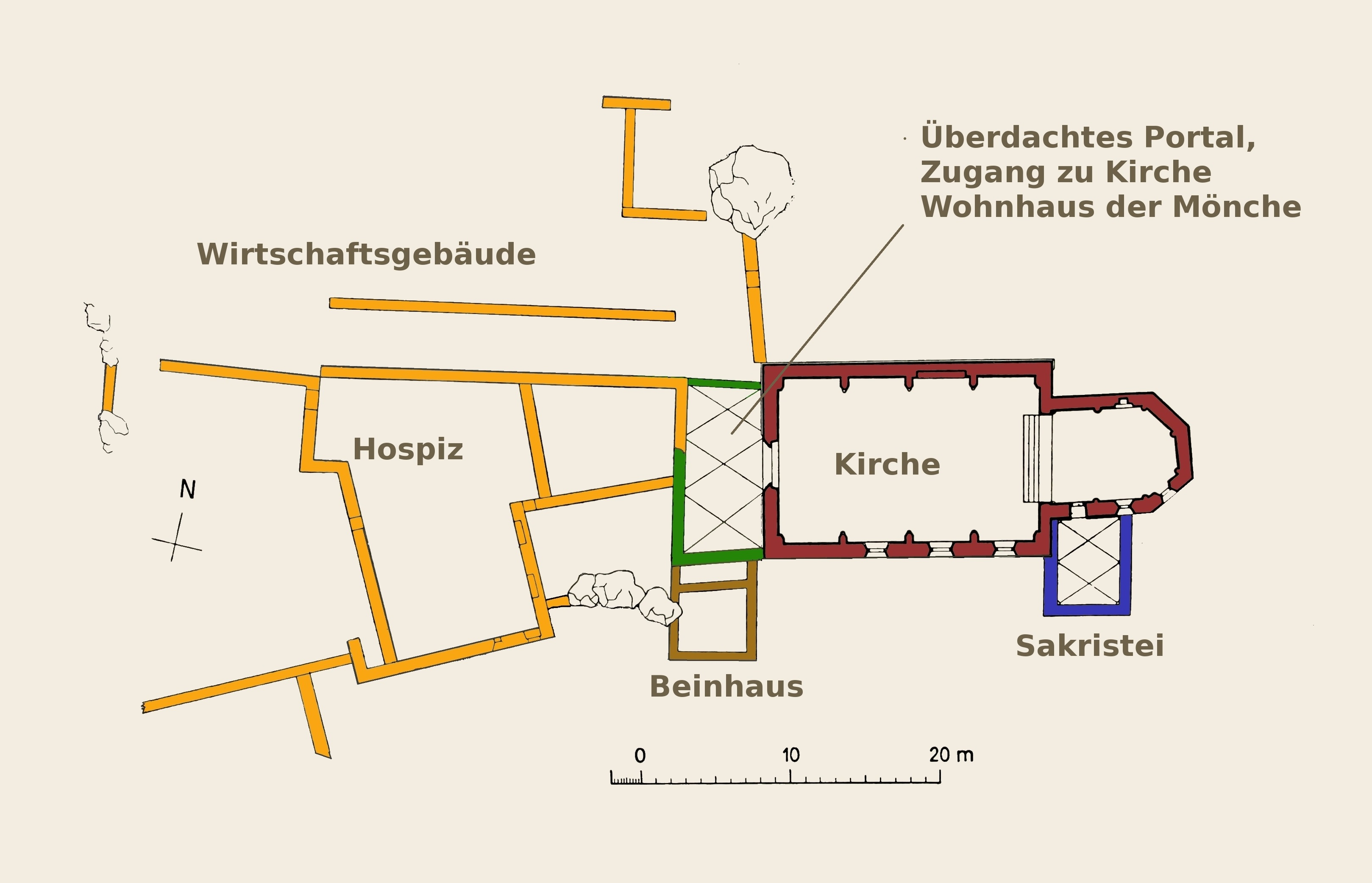 Kirchenruine San Gaudenzio Plan der Anlage